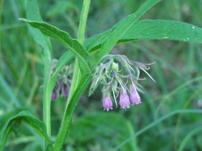 Fekete nadálytő (Symphytum officinale)